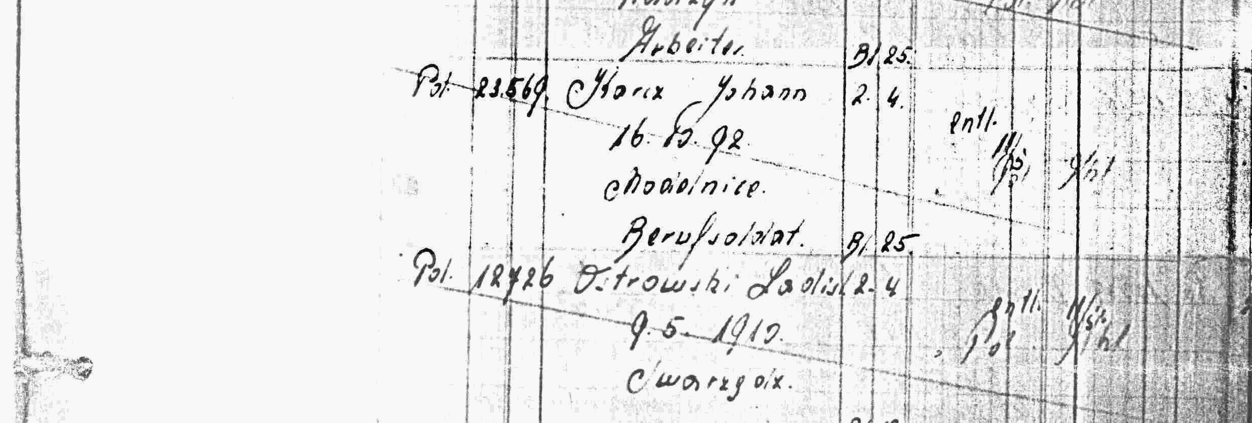 Wycinek z Książki Bunkra Bloku Śmierci będącej w zasobach Archiwum Państwowego Muzeum Auschwitz - Birkenau w Oświęcimiu